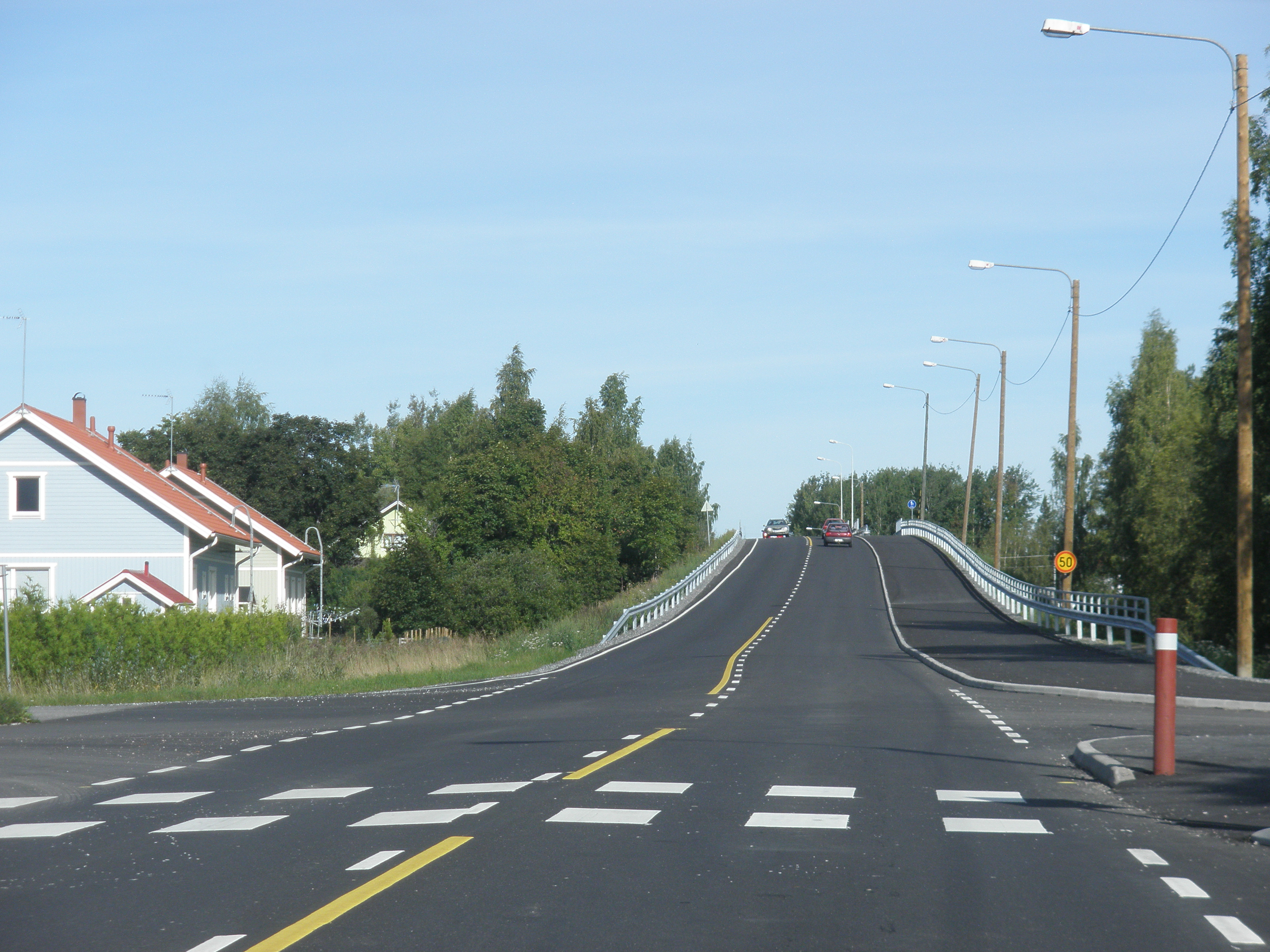 Yhdystie 2224 Liedossa. Kuvassa Turku–Toijala-radan ylittävä silta, jonka kevyen liikenteen väylä avattiin kesällä 2013.